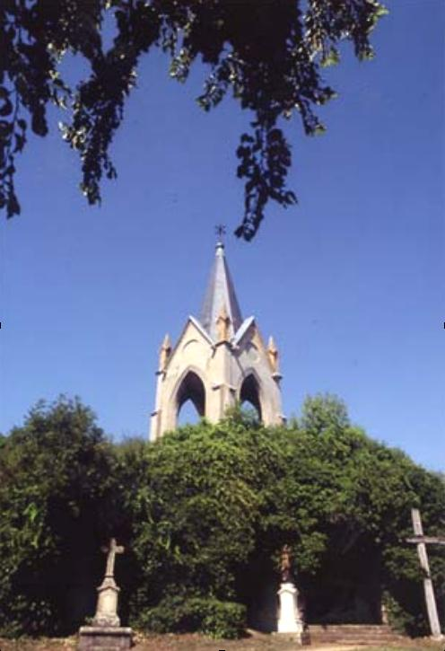 La Motte à Vesoul, chapelle et chemin de croix